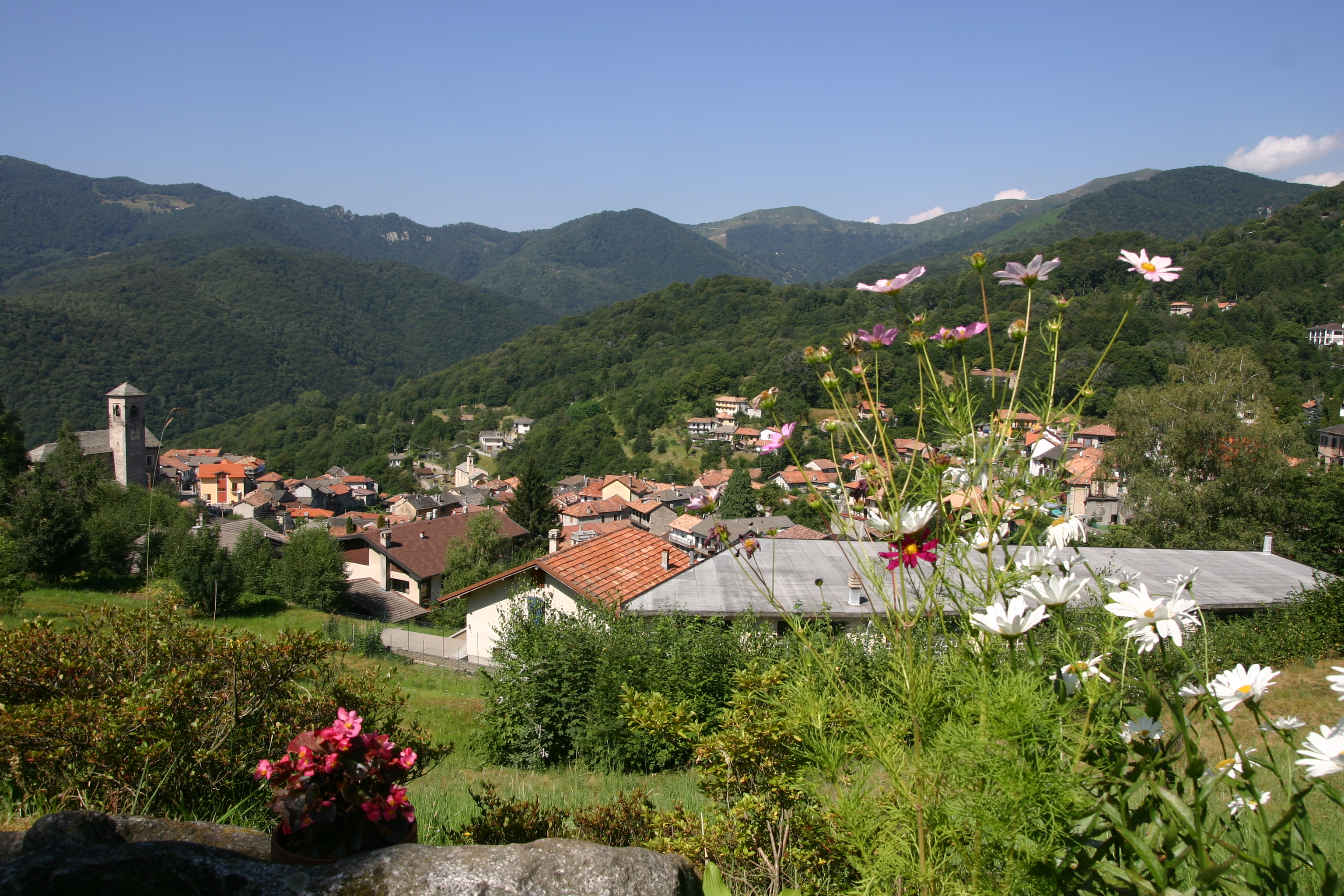 vista